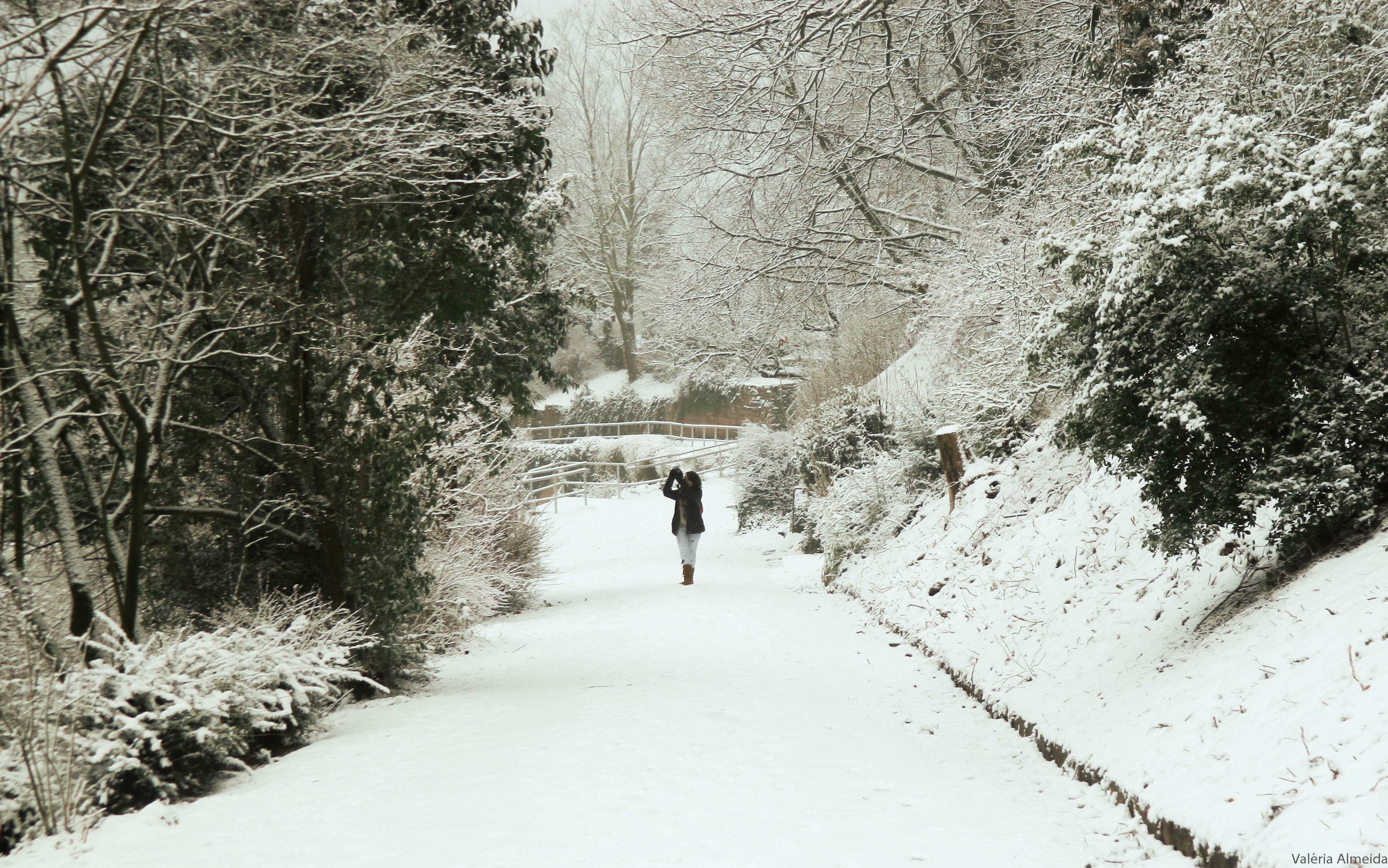 Philosophenweg in Heidelberg, gelegen im Naturpark Neckartal-Odenwald